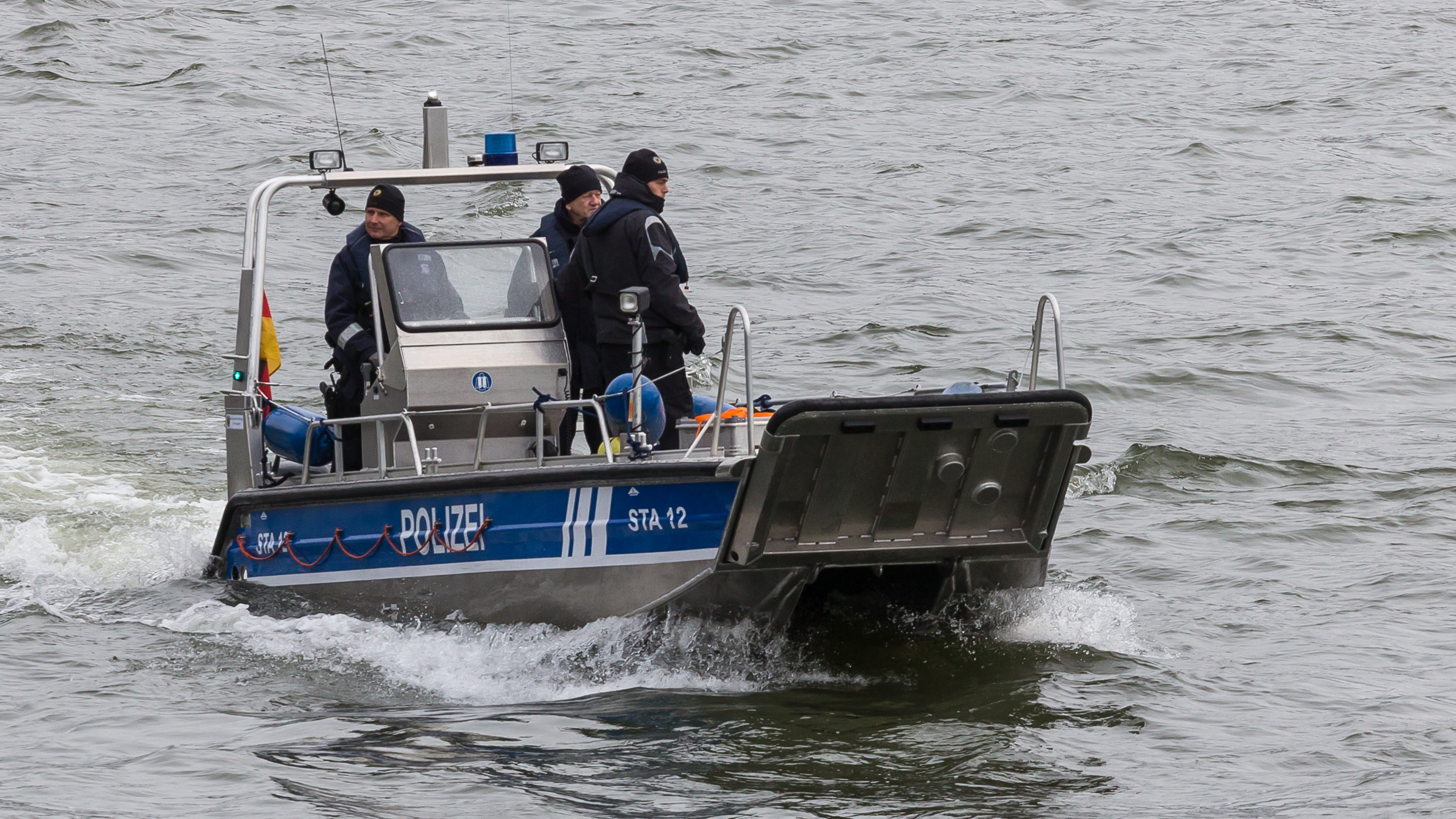 Bundesparteitag der AfD 2017 Köln - rund um den Heumarkt Foto: Das Polizeiboot „STA 12“ patroulliert auf dem Rhein